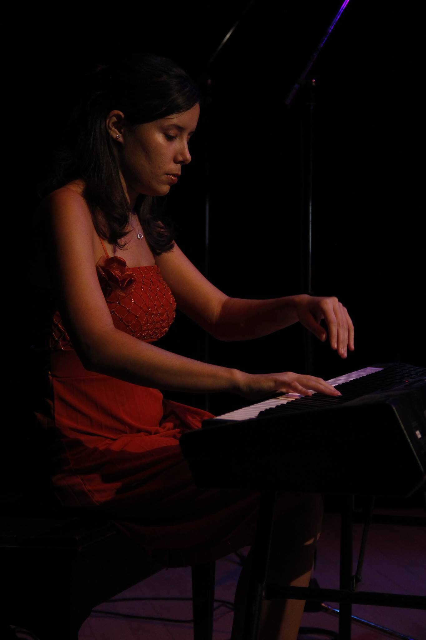 Wilma tocando piano.